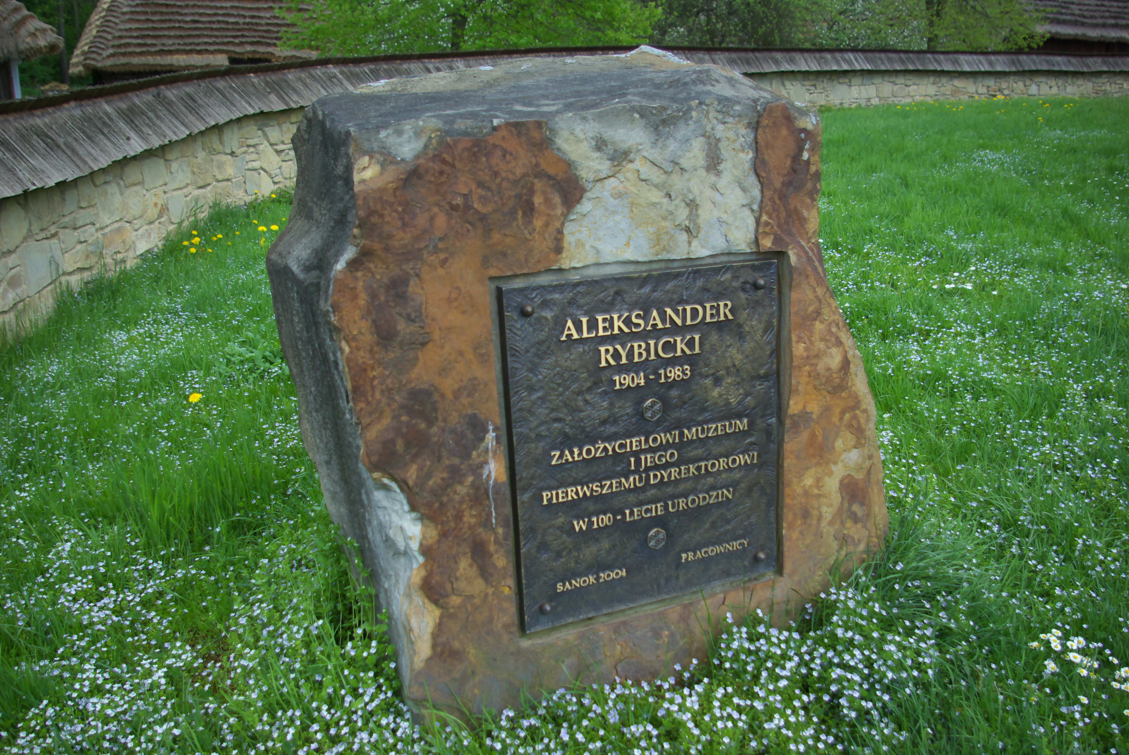 Kamień pamiątkowy honorująca Aleksandra Rybickiego ustanowiony obok kościoła z Bączala Dolnego na terenie Skansenu w Sanoku